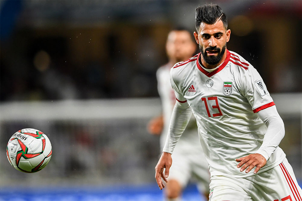 دیدار تیم‌های ملی فوتبال ایران و ژاپن دیدار تیم های ملی فوتبال ایران و ژاپن در مرحله نیمه نهایی هفدهمین دوره جام ملت های آسیا ۲۰۱۹ امارات ، با برتری ۳ بر صفر ژاپن در ورزشگاه بن زاید شهر العین برگزار شد.